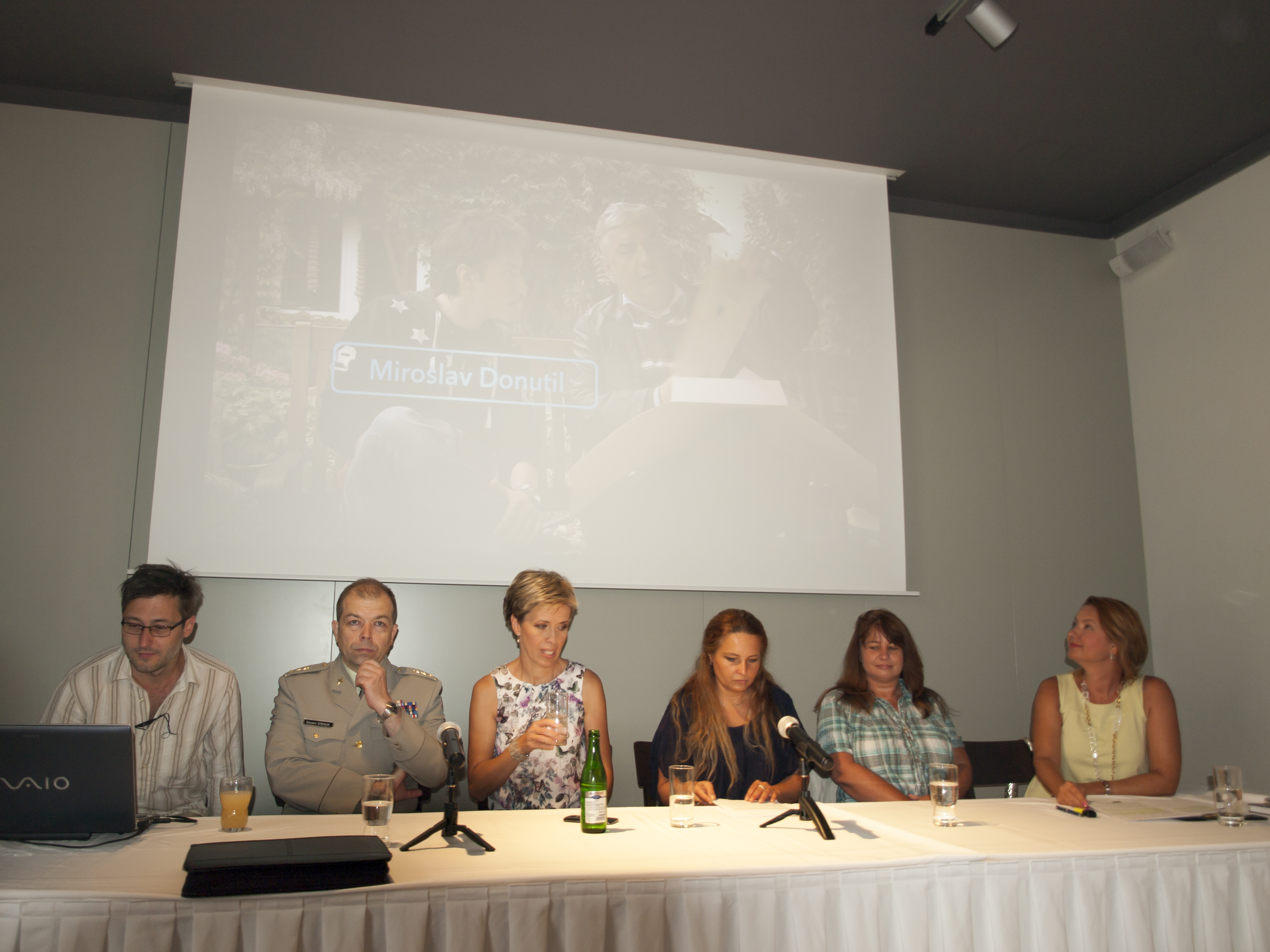 Fotky z novinářské konference 26.8.2015. Autor: Blanka Borová (Karolína Černá) pro Kritiky.cz & 10Mpix.cz